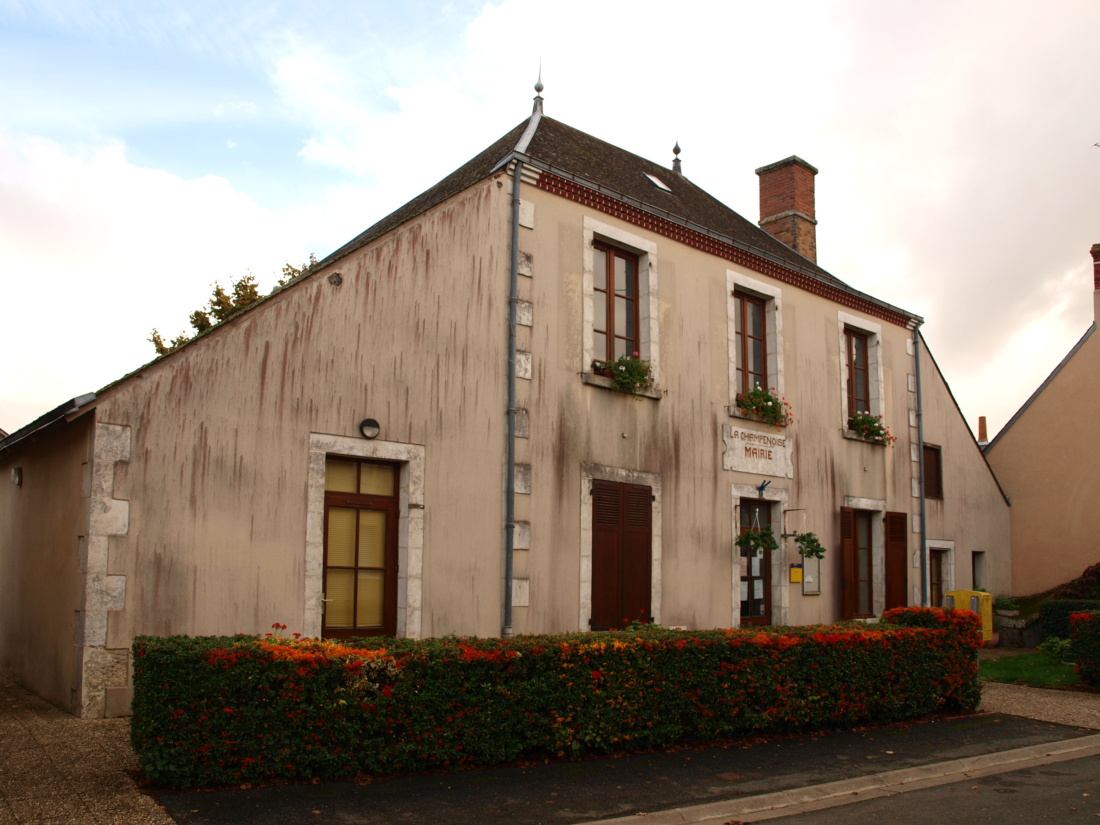 La Champenoise (Indre, France) ; mairie